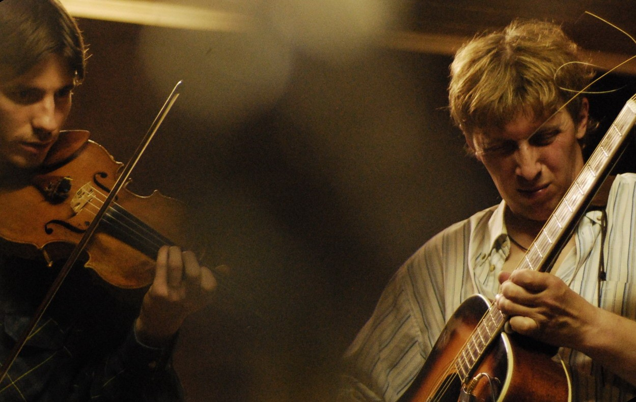 М. Богатырев, К. Игнатенко (2007)